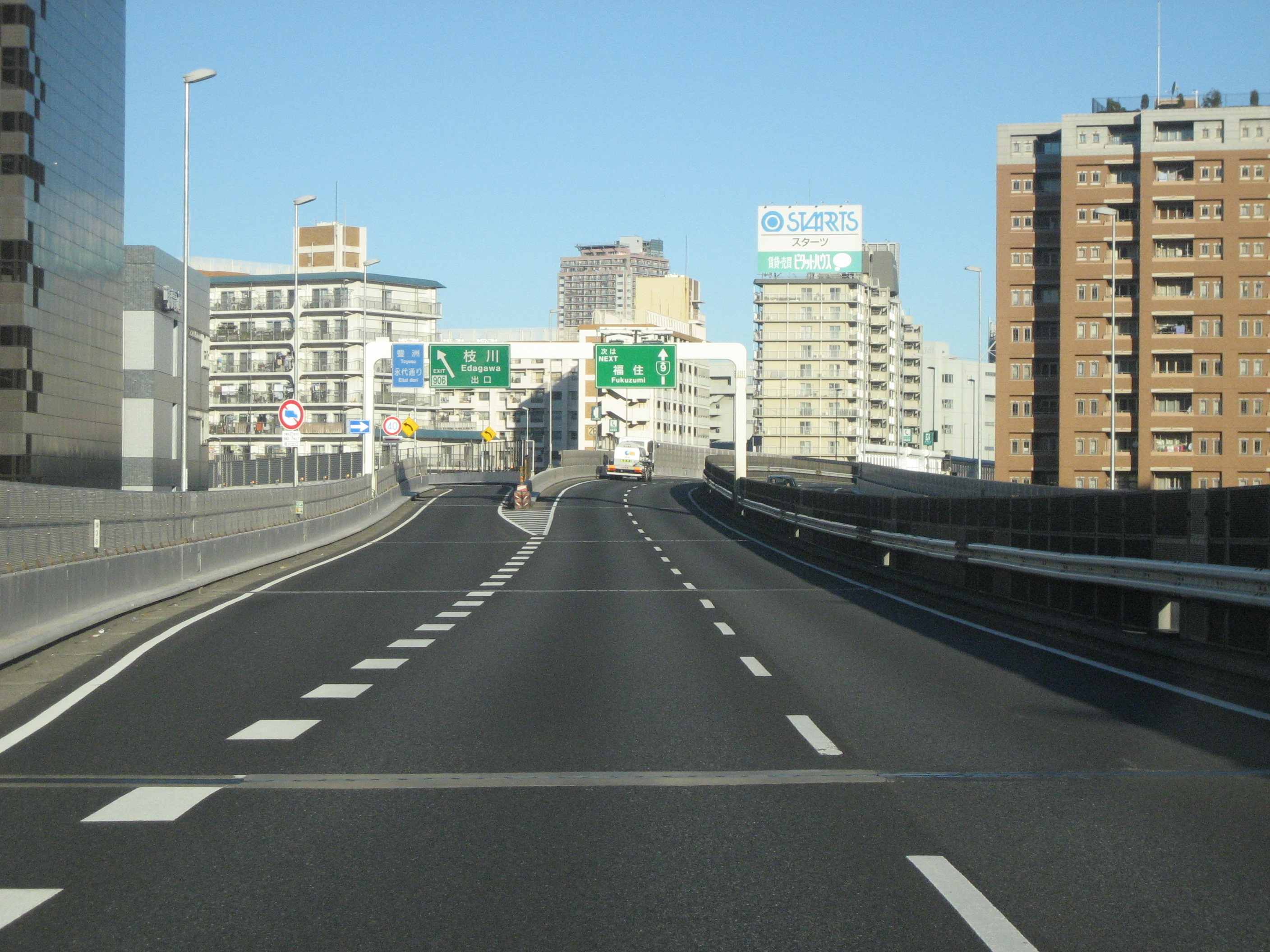 首都高速枝川出口（上り）